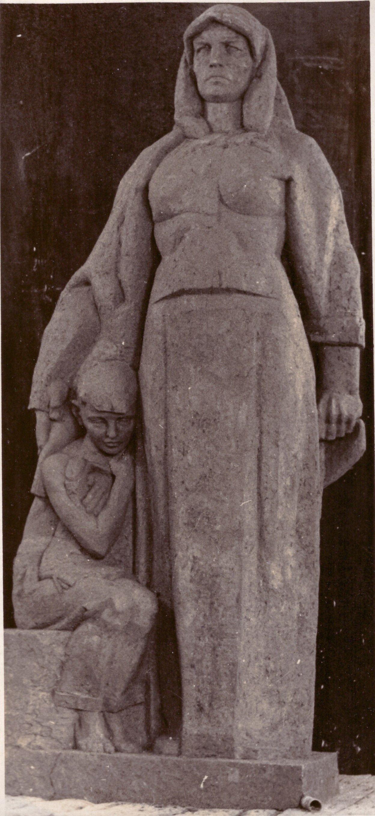 Пам’ятник загиблим воїнам-односельчанам в роки Великої Вітчизняної війни 1941-1945 р.р. С. Куражино Новоушицький район Хмельницька область. 1969. Скульптор Таранченко В.О. Литий бетон.